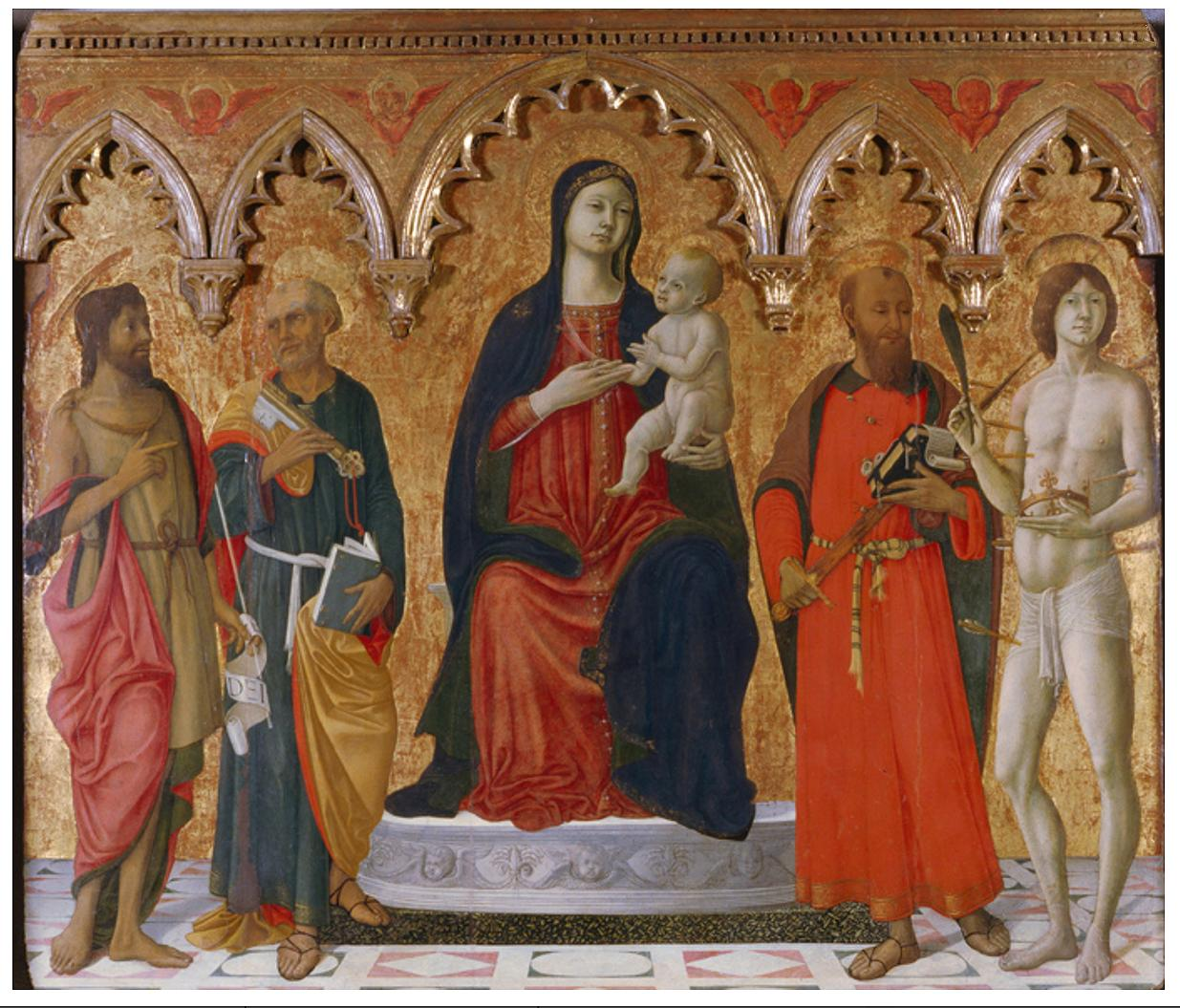 Pietro di Francesco Orioli, Madonna col Bambino in trono e i santi Giovanni Battista, Pietro, Paolo e Sebastiano, tempera su tavola